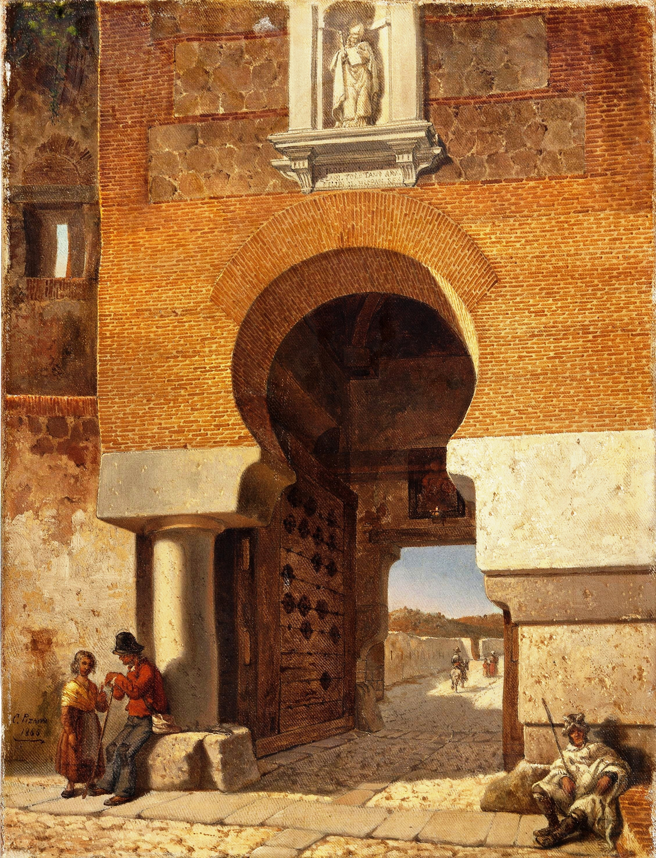 La obra representa la puerta de la plaza de armas del puente de Alcántara de la ciudad de Toledo, en España.